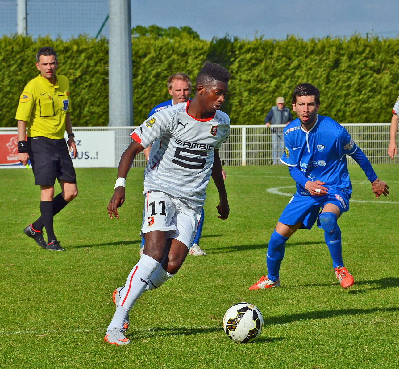 Photographie d'Ousmane Dembélé, balle au pied, lors d'un match de CFA2 opposant le FC Saint-Lô au Stade rennais le 23 mai 2015.